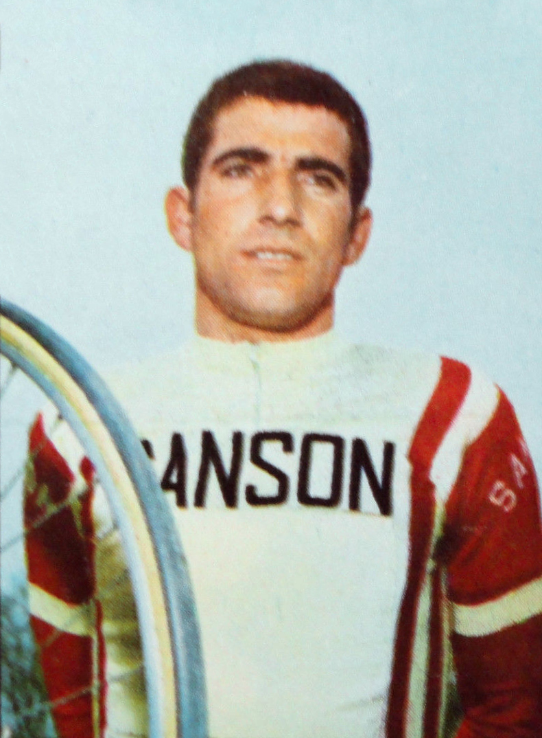 Figurina CAMPIONI DELLO SPORT 1969/70-n.191-MARCELLI (ITA)-CICLISMO-rec